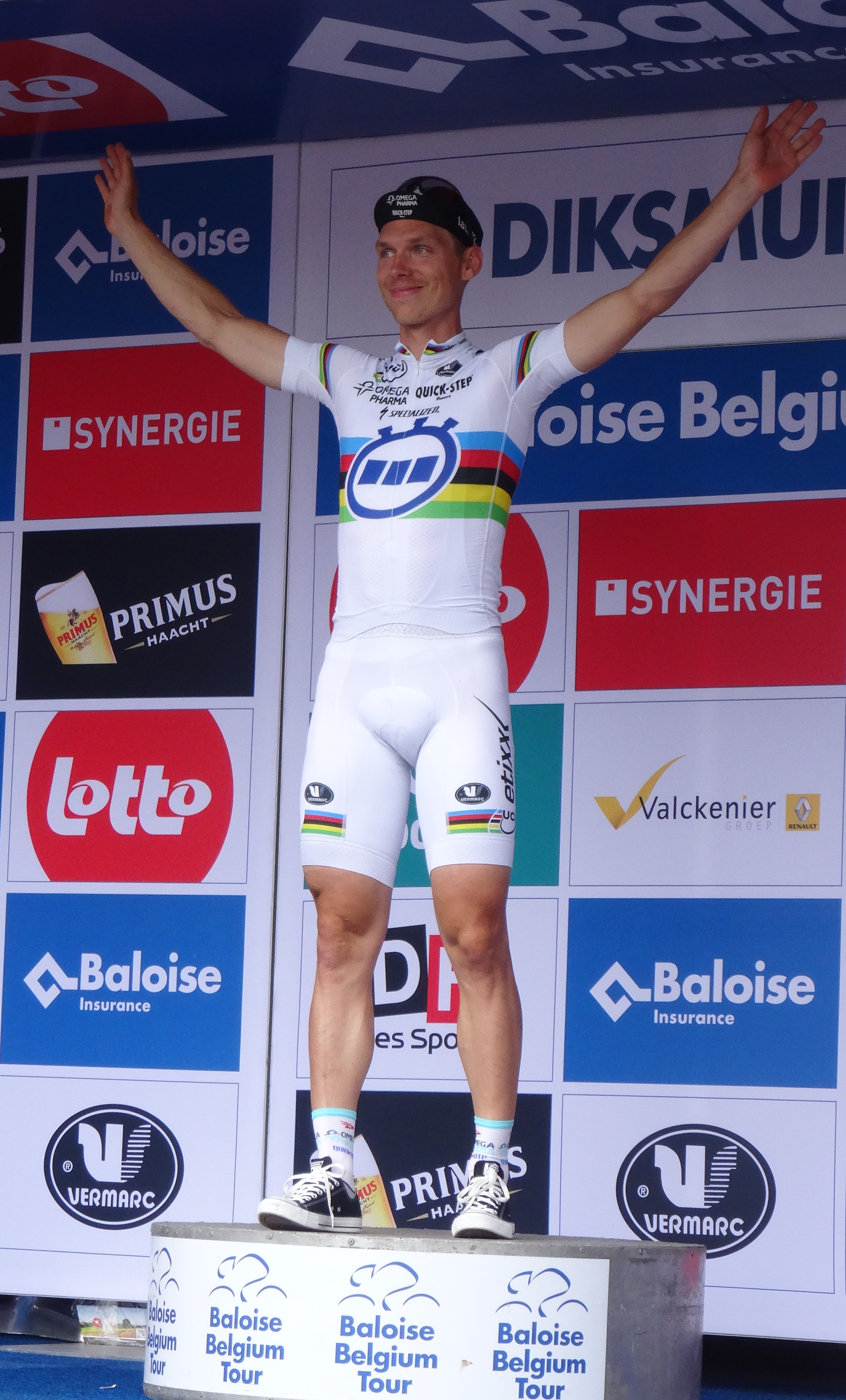 Reportage photographique réalisé le vendredi 30 mai à l'occasion du contre-la-montre individuel de la troisième étape du Tour de Belgique 2014 à Dixmude, Belgique.